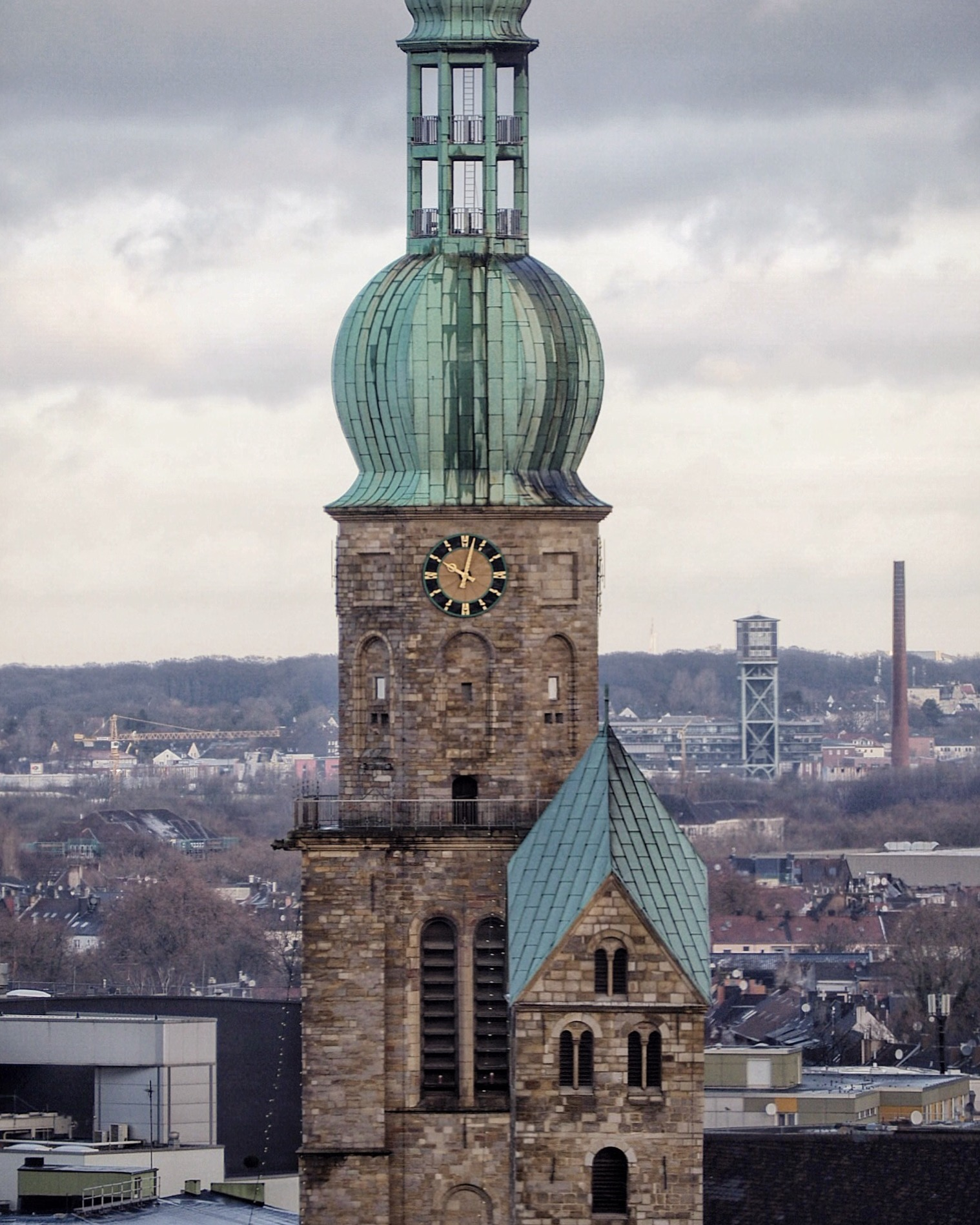 St. Reinoldi und St. Marien Kirche